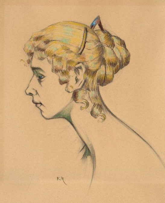 Konrad Mägi "Elo Tuglase portree"